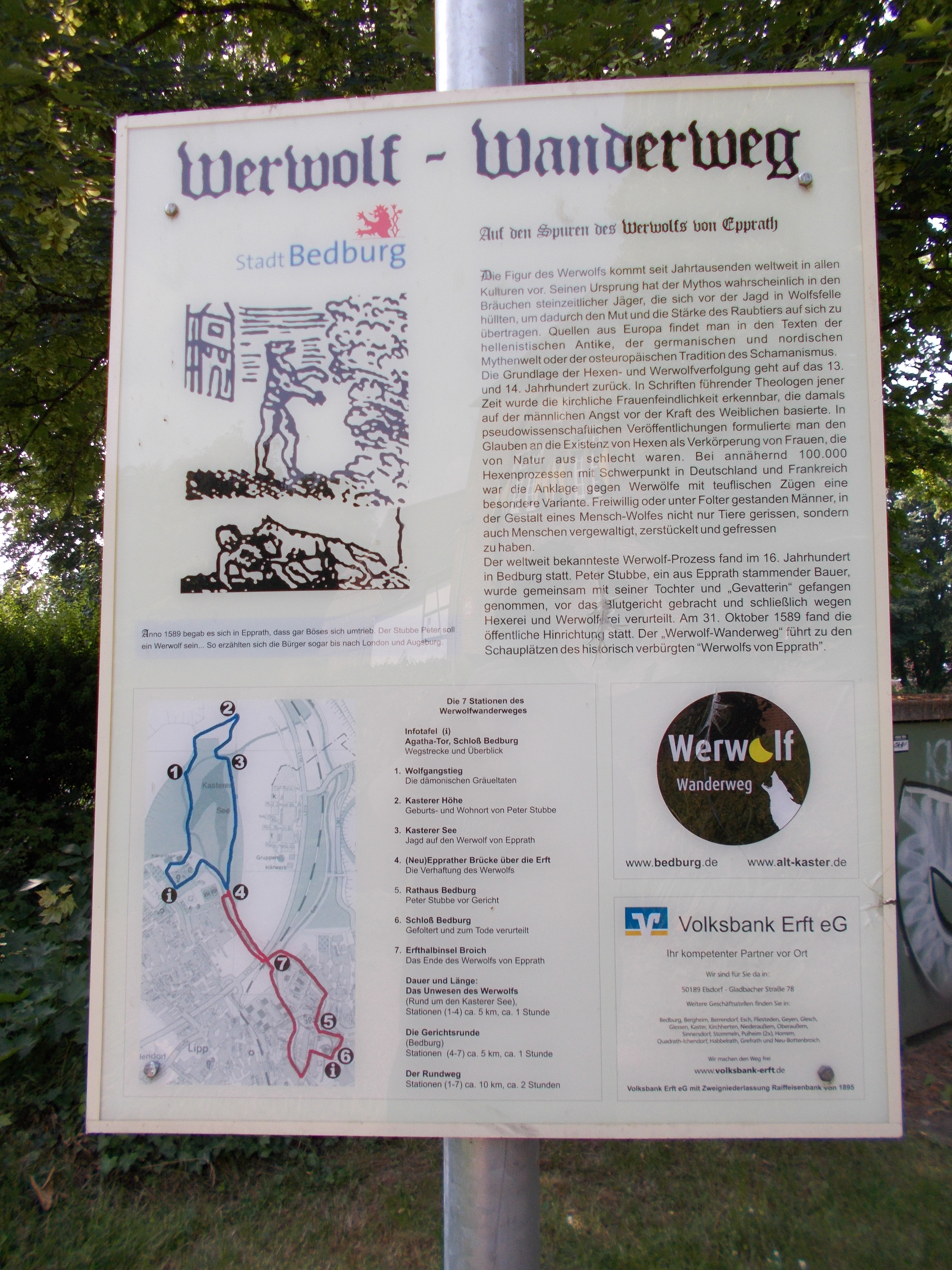 Gesamtinformationstafel über den Werwolf-Wanderweg am Agatha-Tor in Bedburg-Altkaster.